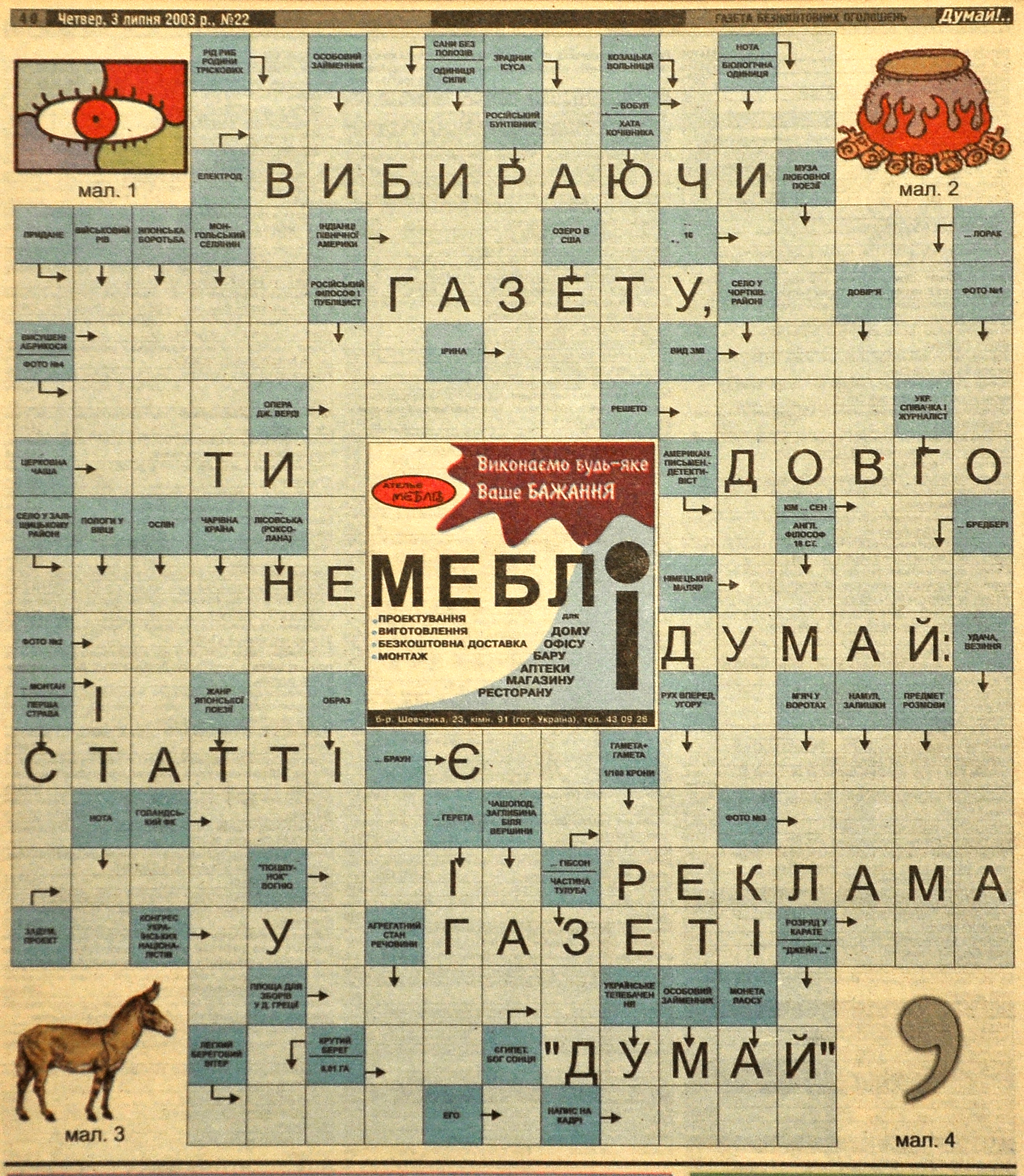 Скандинавський кросворд Миколи Василечка в газеті «Думай», № 22 від 3 липня 2003 року.